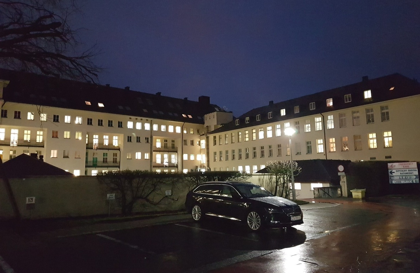 Szpital PSK 1 PUM